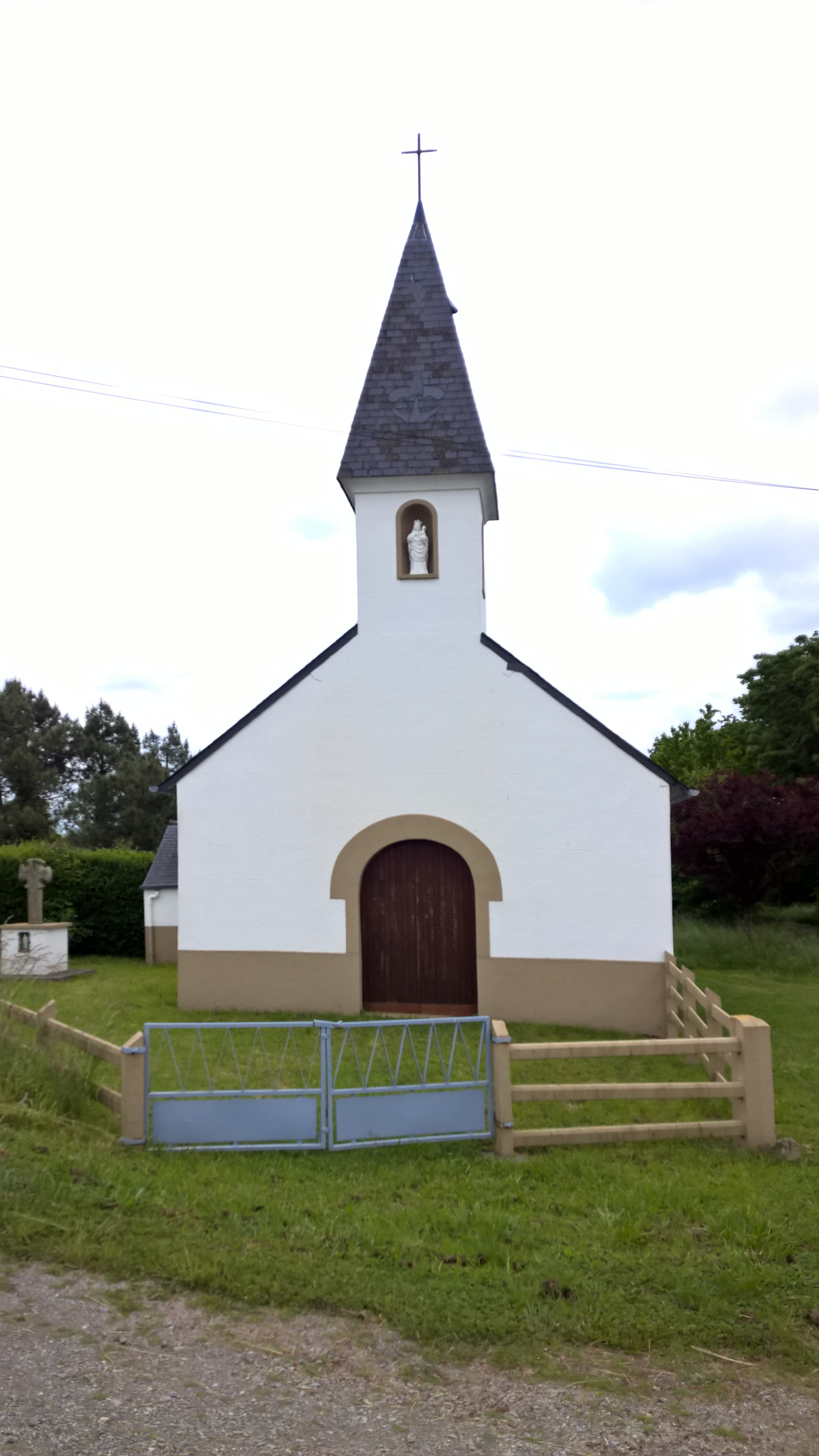 Chapelle Bonne-Nouvelle, Fr-44-Donges.